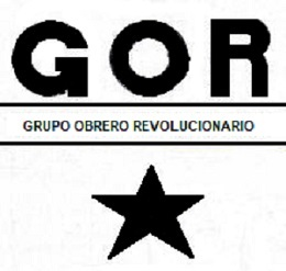 Siglas del grupo guerrillero argentino Grupo Obrero Revolucionario